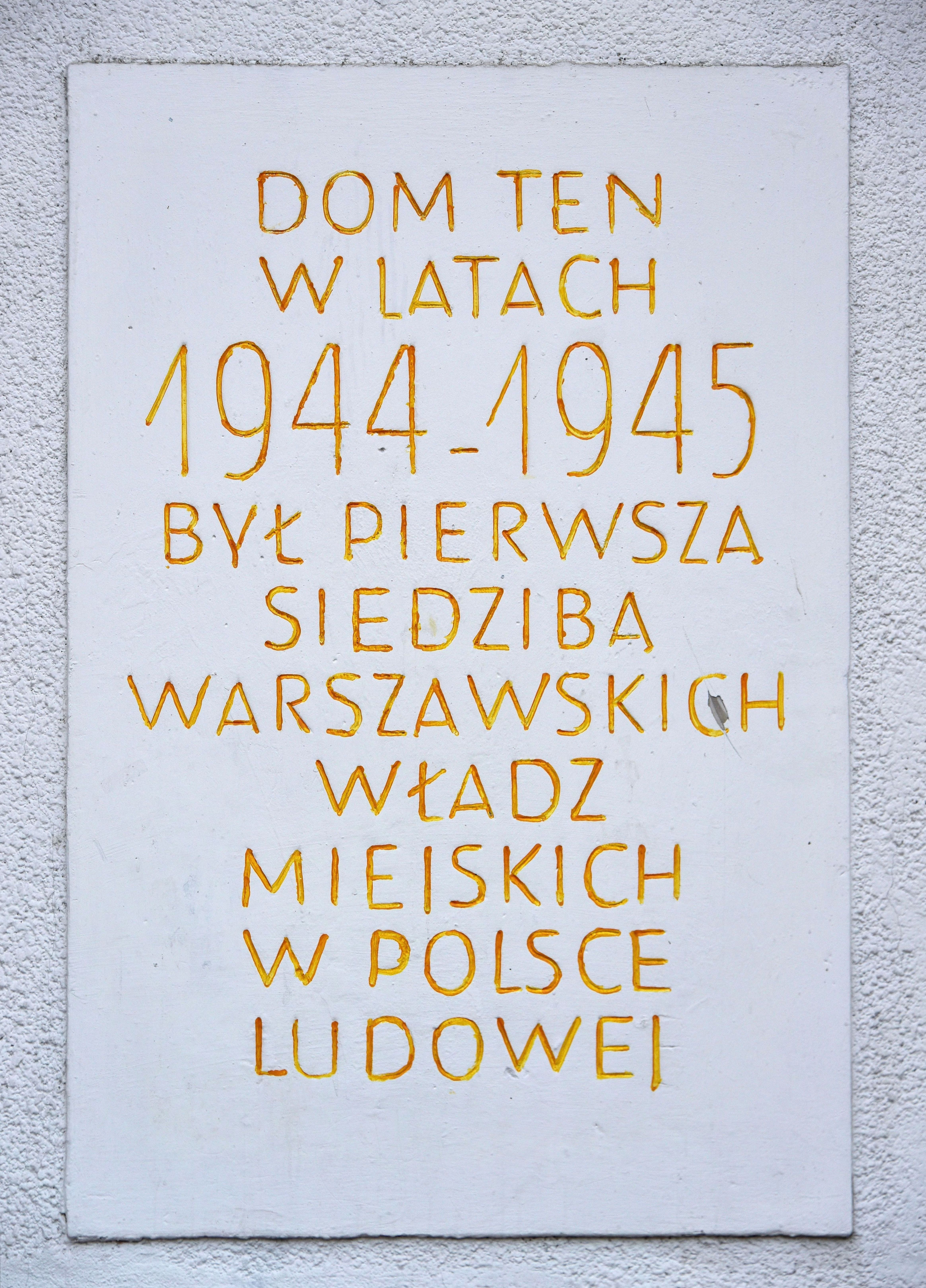 Tablica przy wejściu do budynku szkolnego przy ul. Otwockiej 3 w Warszawie